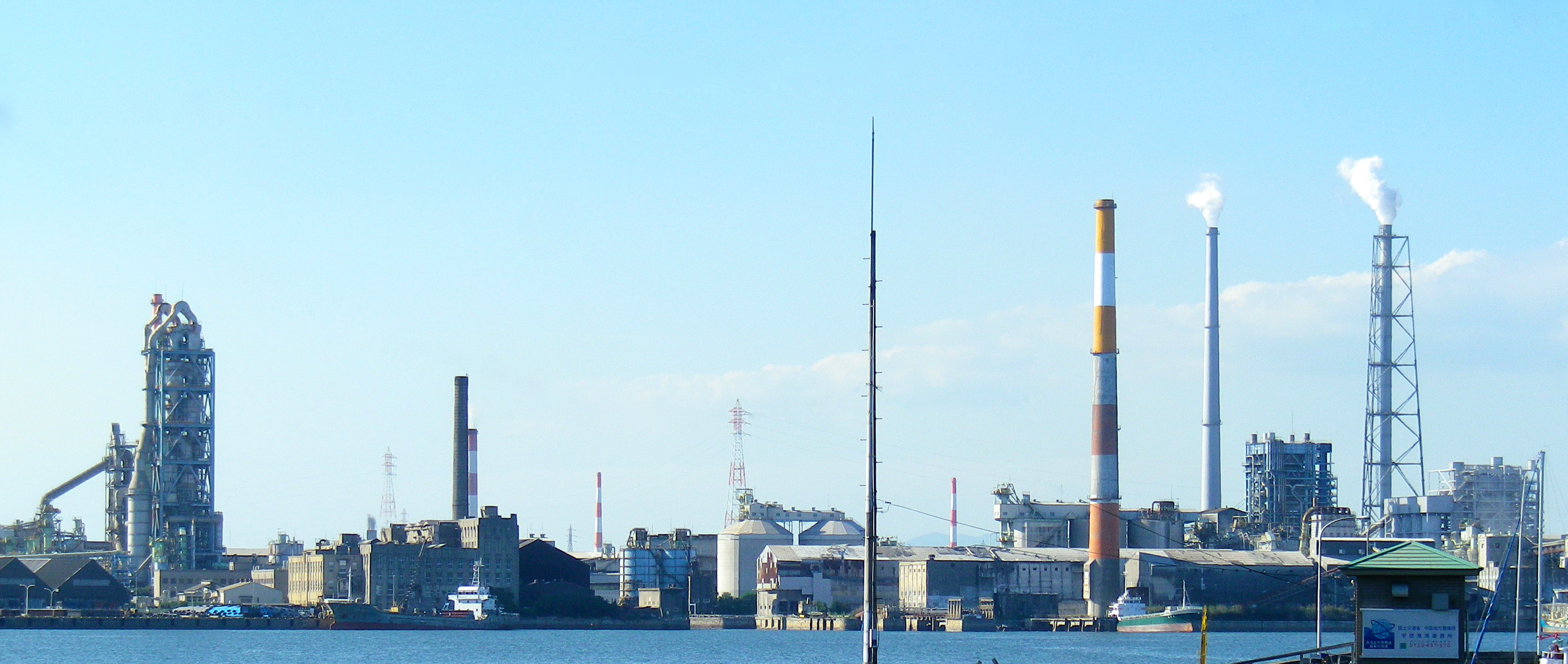 山口県宇部市。宇部興産小串地区工場群。宇部港本港地区および小串地区。